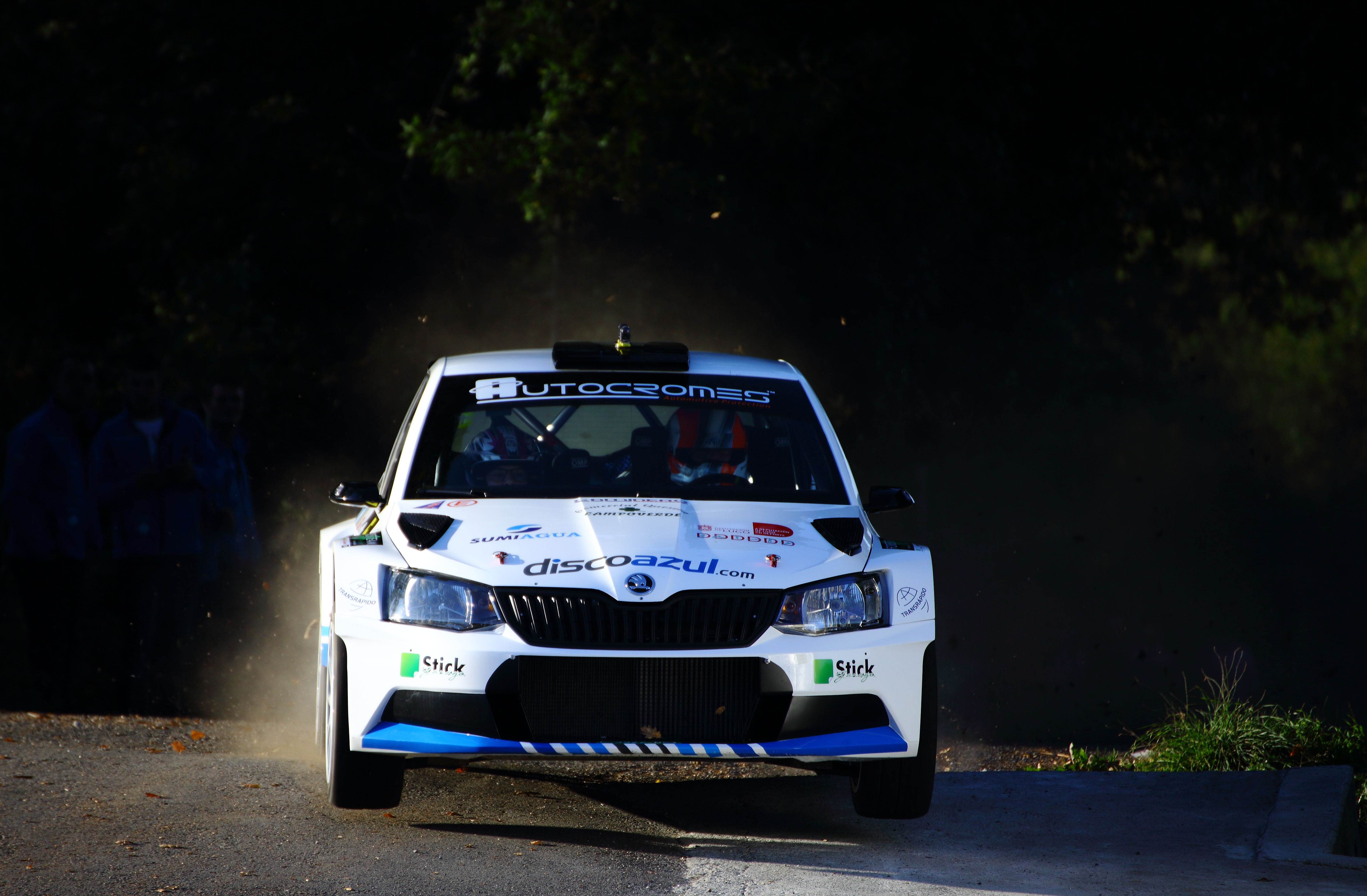 Adrián Díaz gana el Rally San Froilán.